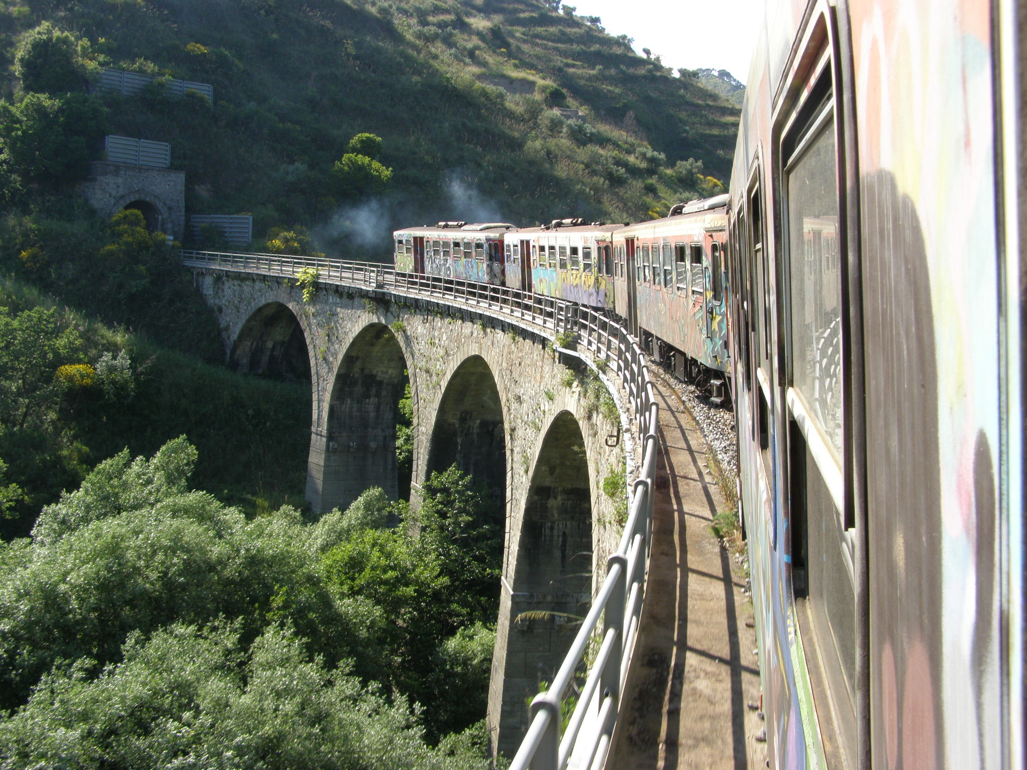 Quadrupla di M4c sul Ponte della Fiumarella, dirette a Catanzaro Città